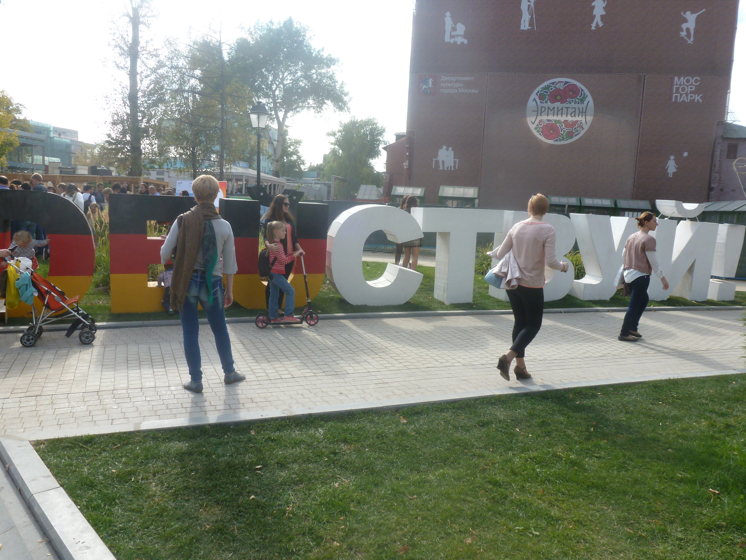 Festivalo de germana lingvo en Moskvo, Rusio, en jaro 2014.